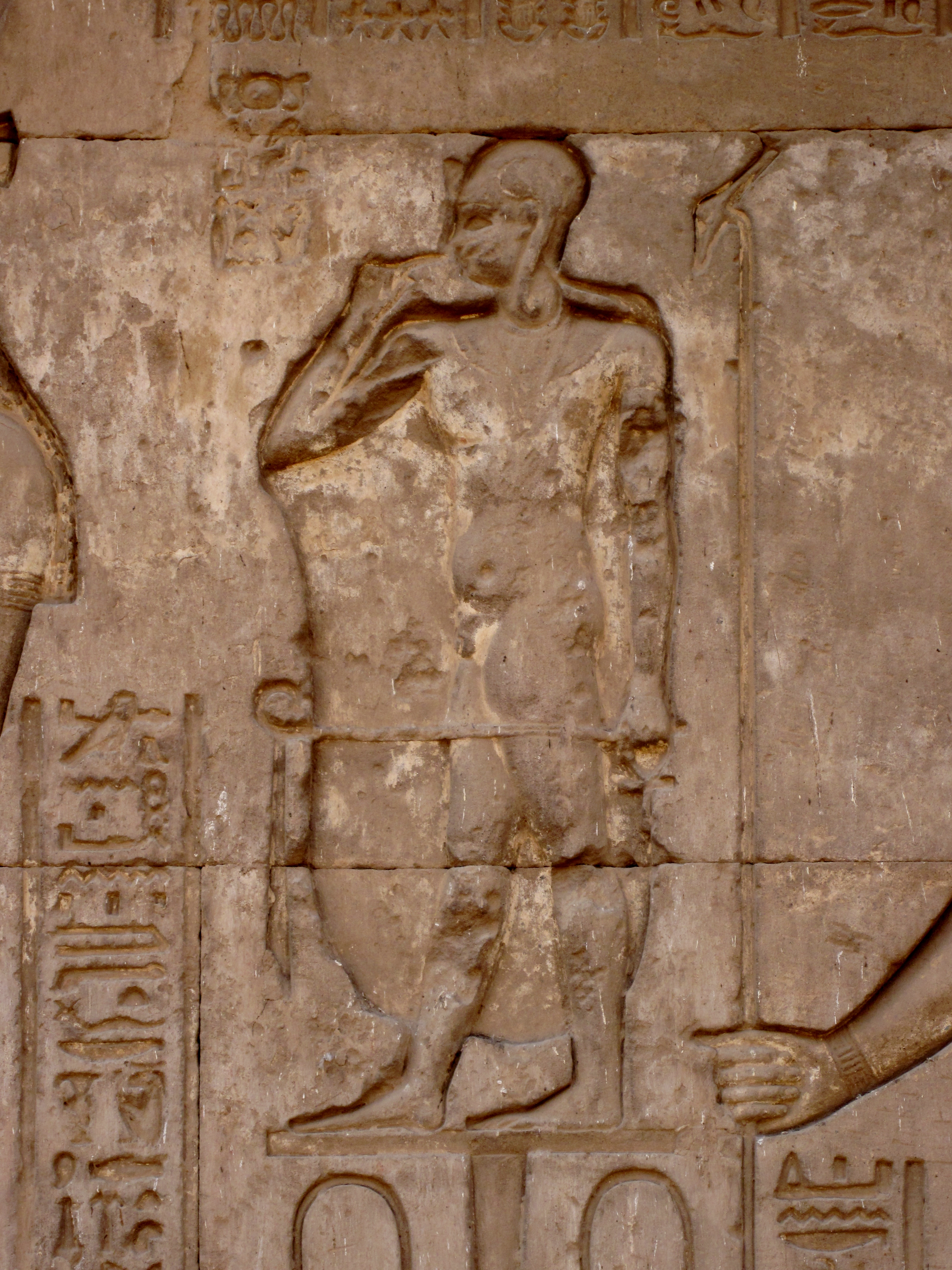 Der Kindgott Heka-pa-chered auf einem Podest an der Fassade des Chnum-Tempels in Esna, Ägypten